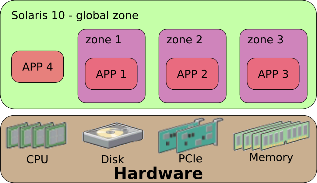 Solaris Zones schema